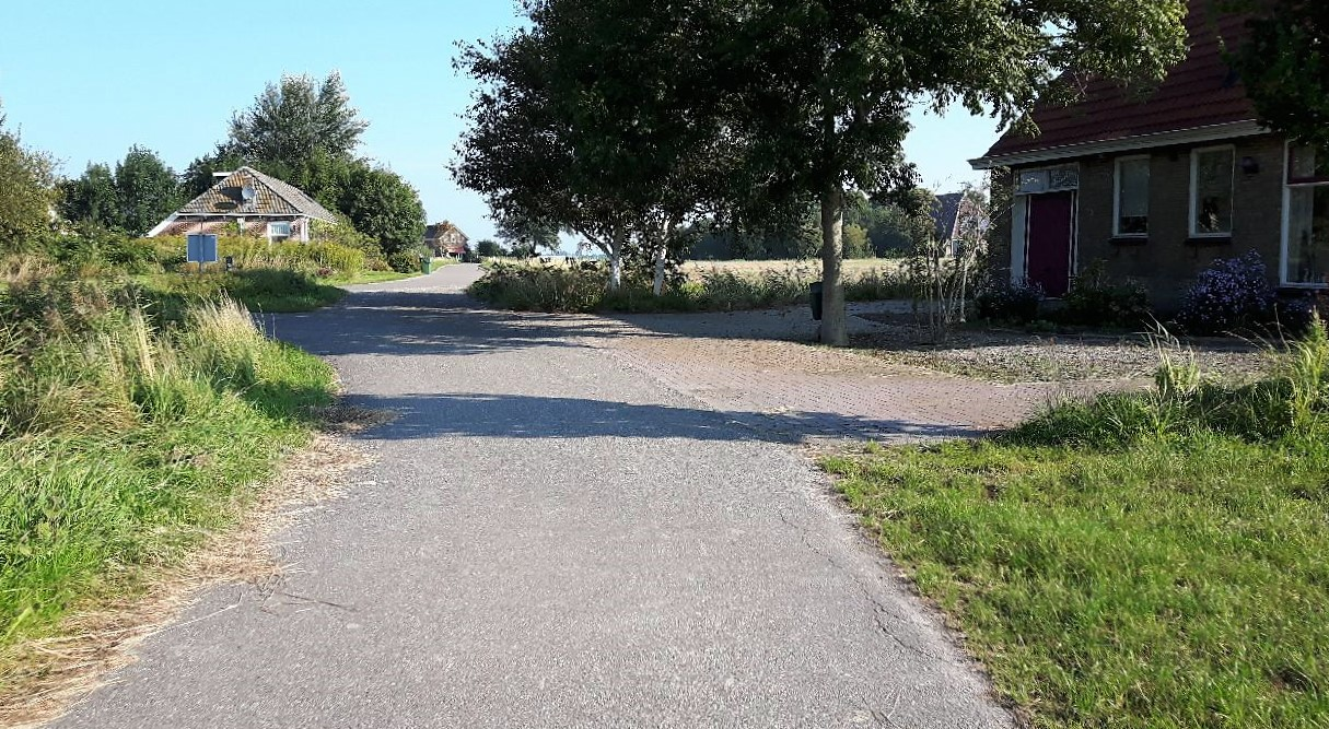 Voorrijp Foarryp